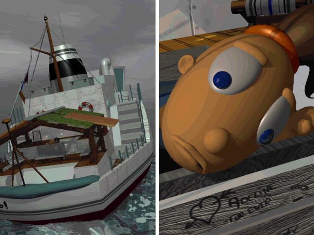 Capture d'écran du jeu vidéo Little Big Adventure (1994), développé par Adeline Software International.